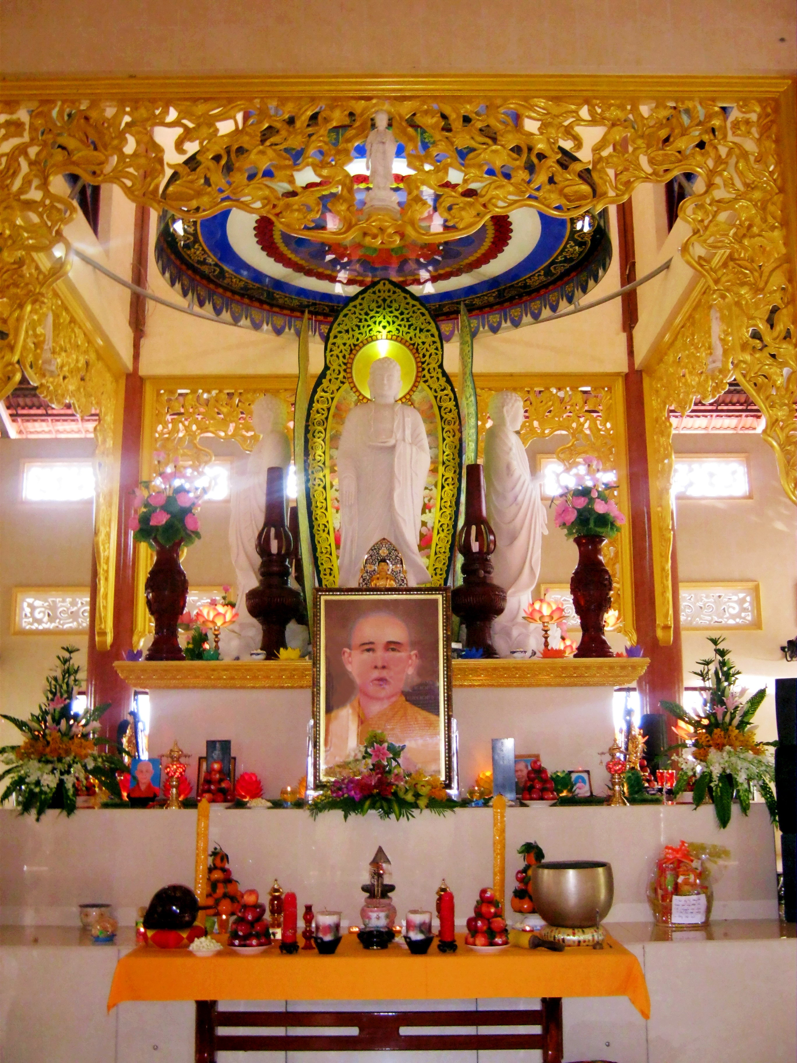 Bàn thờ Hòa thượng Thích Thiện Quang (1895 - 1953) trong chùa Vạn Linh ở núi Cấm (Tịnh Biên, An Giang, Việt Nam).